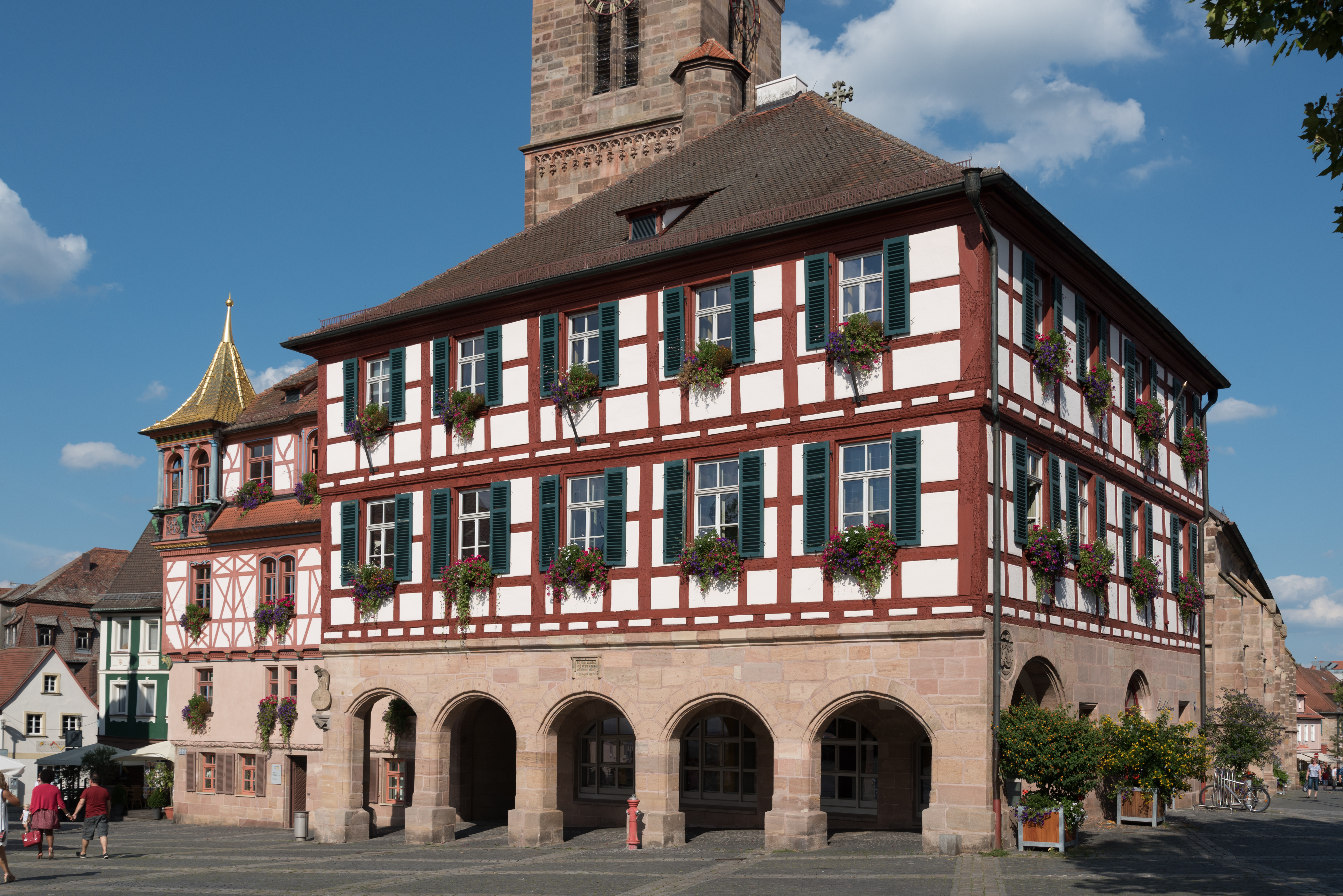 Schwabach, Köngigsplatz 1, 1b, Rathaus